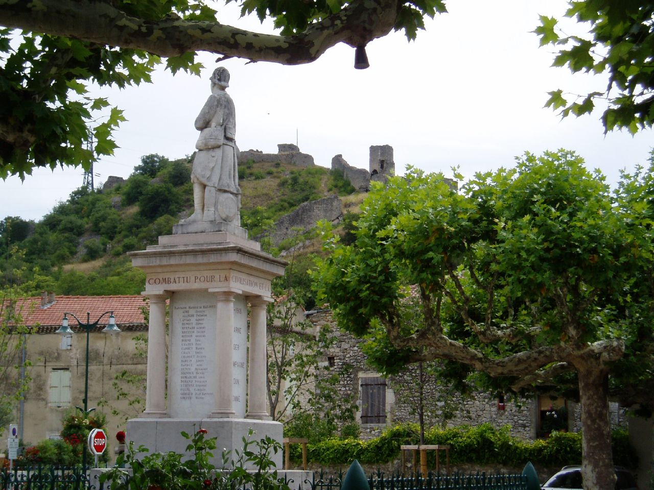 Châteauneuf-du-Rhône avec le château au fondChateauneuf-du-Rhone